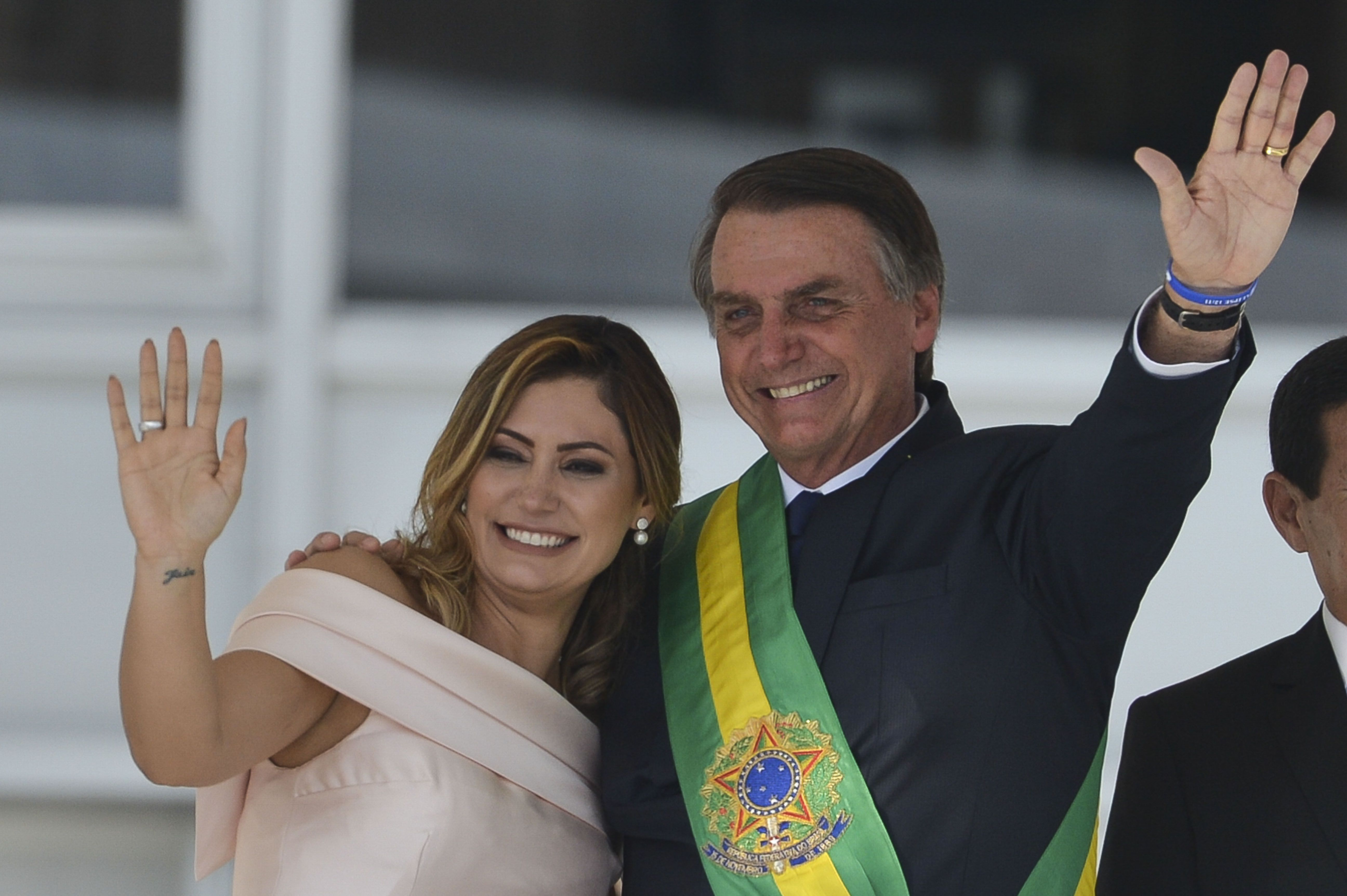 O presidente Jair Bolsonaro recebe a Faixa Presidencial